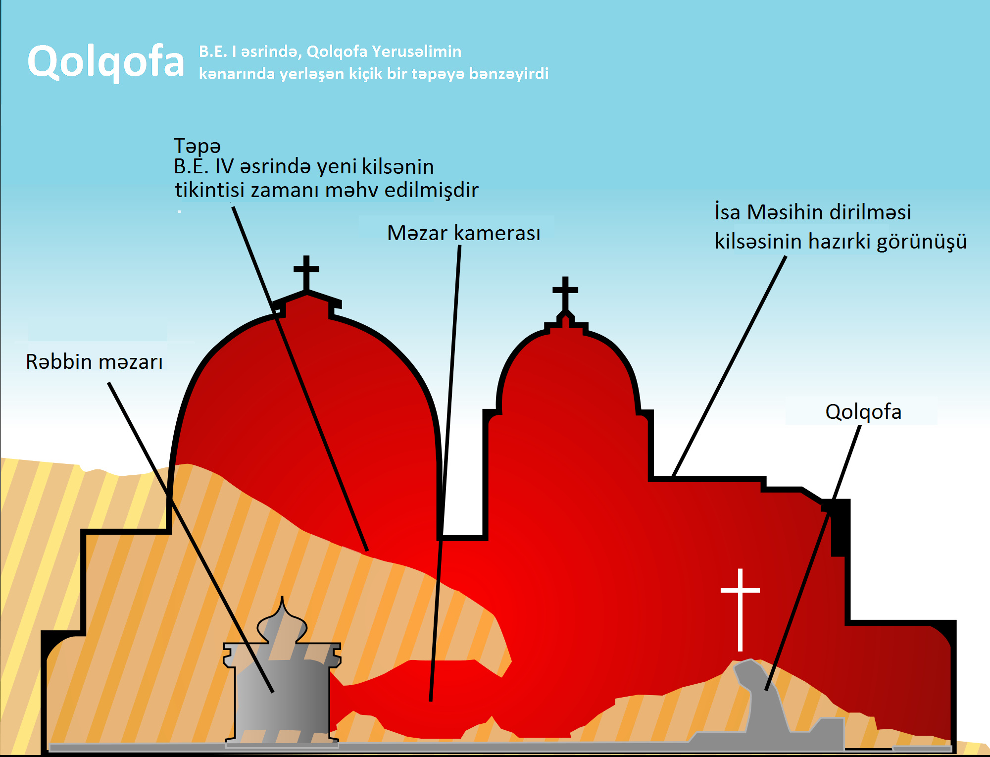 Схема Голгофы